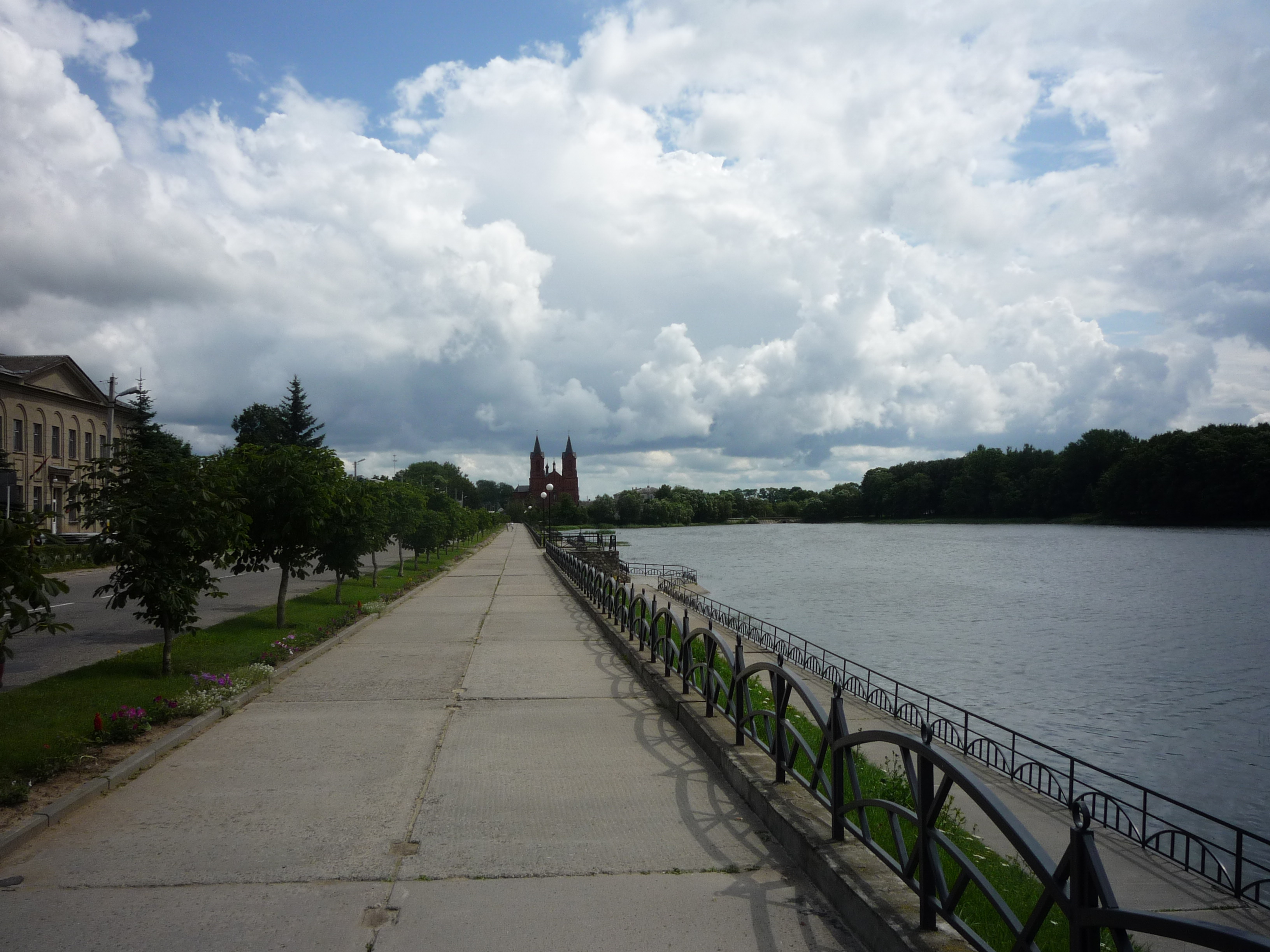 Беларуская (тарашкевіца): Усьпенскі касьцёл. г. Мёры This is a photo of Belarusian heritage monument. Reference number: 213Г000551 ( WLM)